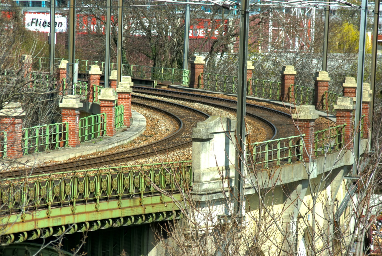 S-Bahn Schienen auf der Otta Wagner Viadukt in Heiligenstadt